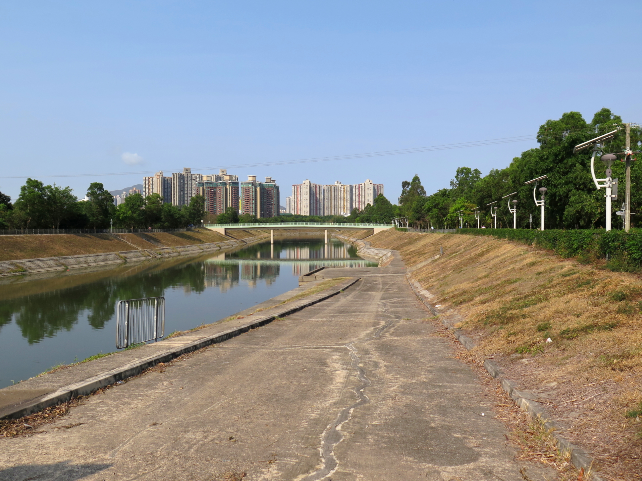 Ng Tung River